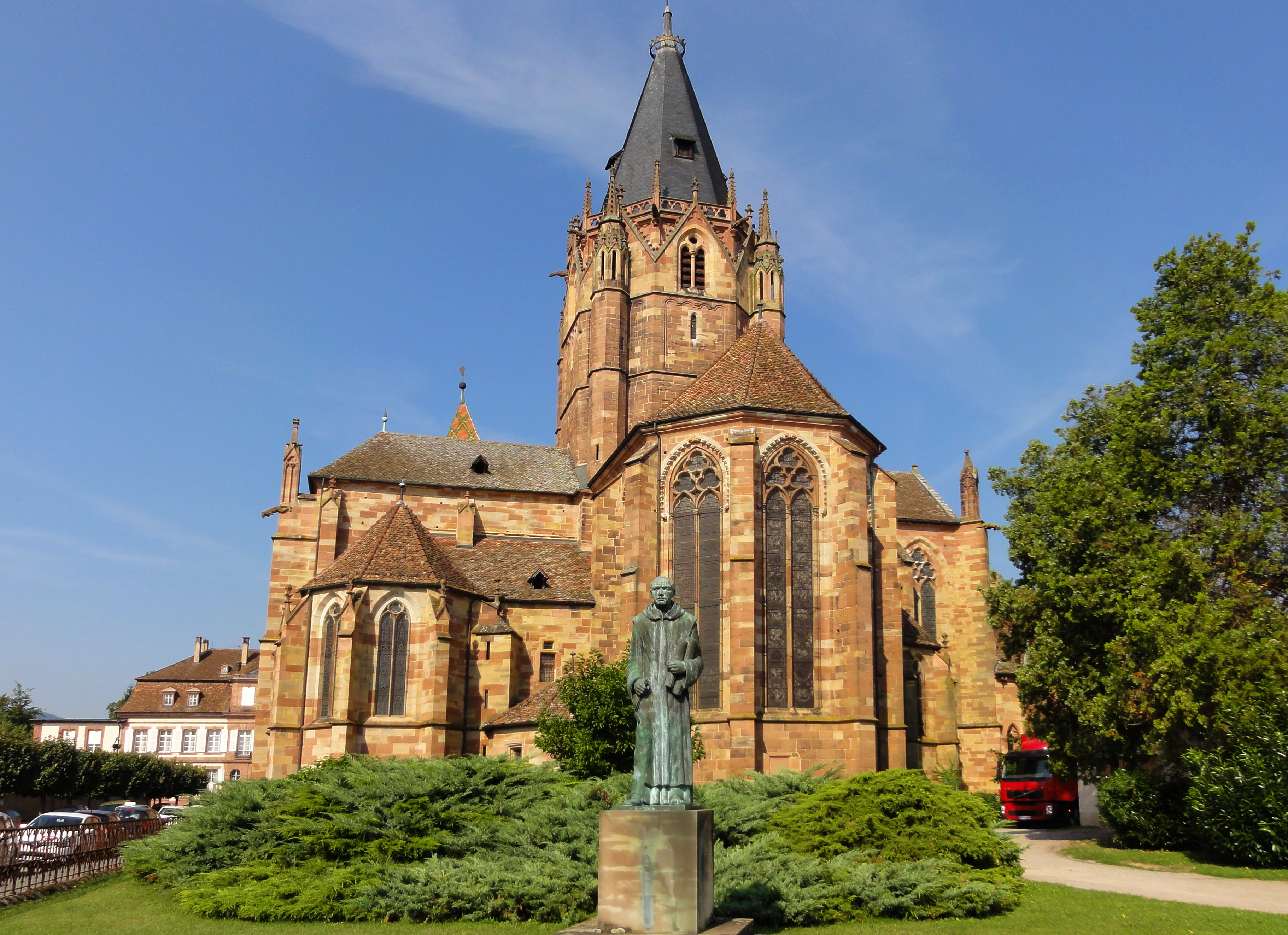 Alsace, Bas-Rhin, Wissembourg, Église abbatiale Saints-Pierre-et-Paul (PA00085247, IA67008036).